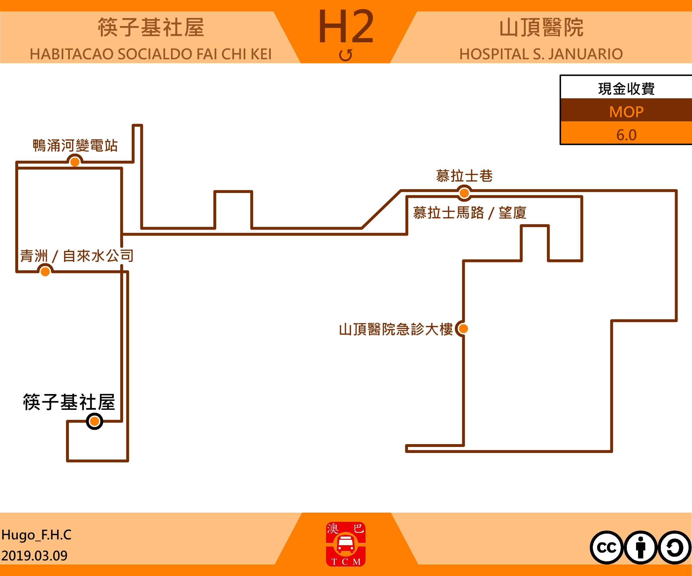 澳門巴士H2走線圖